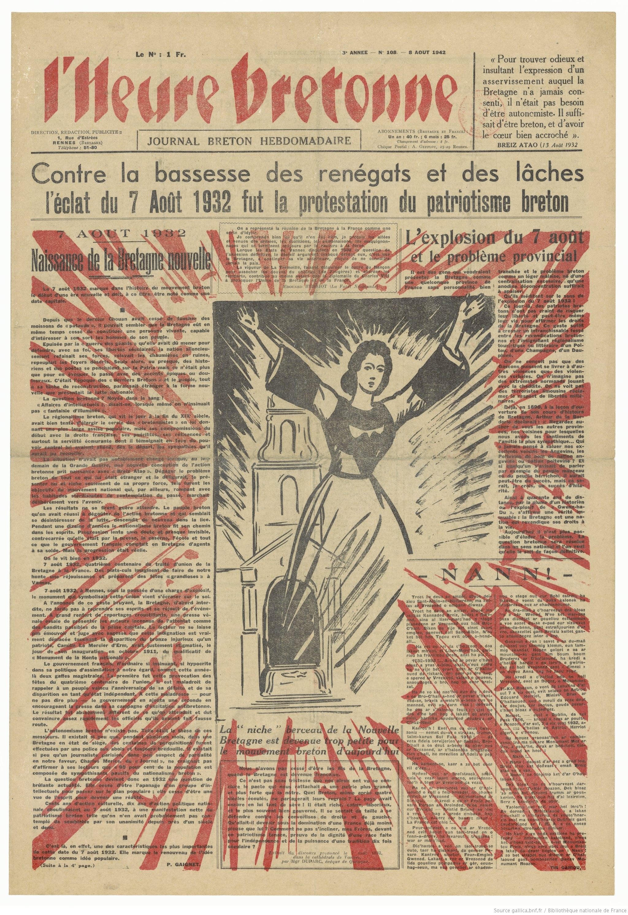 Première page de l'Heure bretonne du 8 août 1942, célébrant l'Attentat du 7 août 1932 à Rennes.